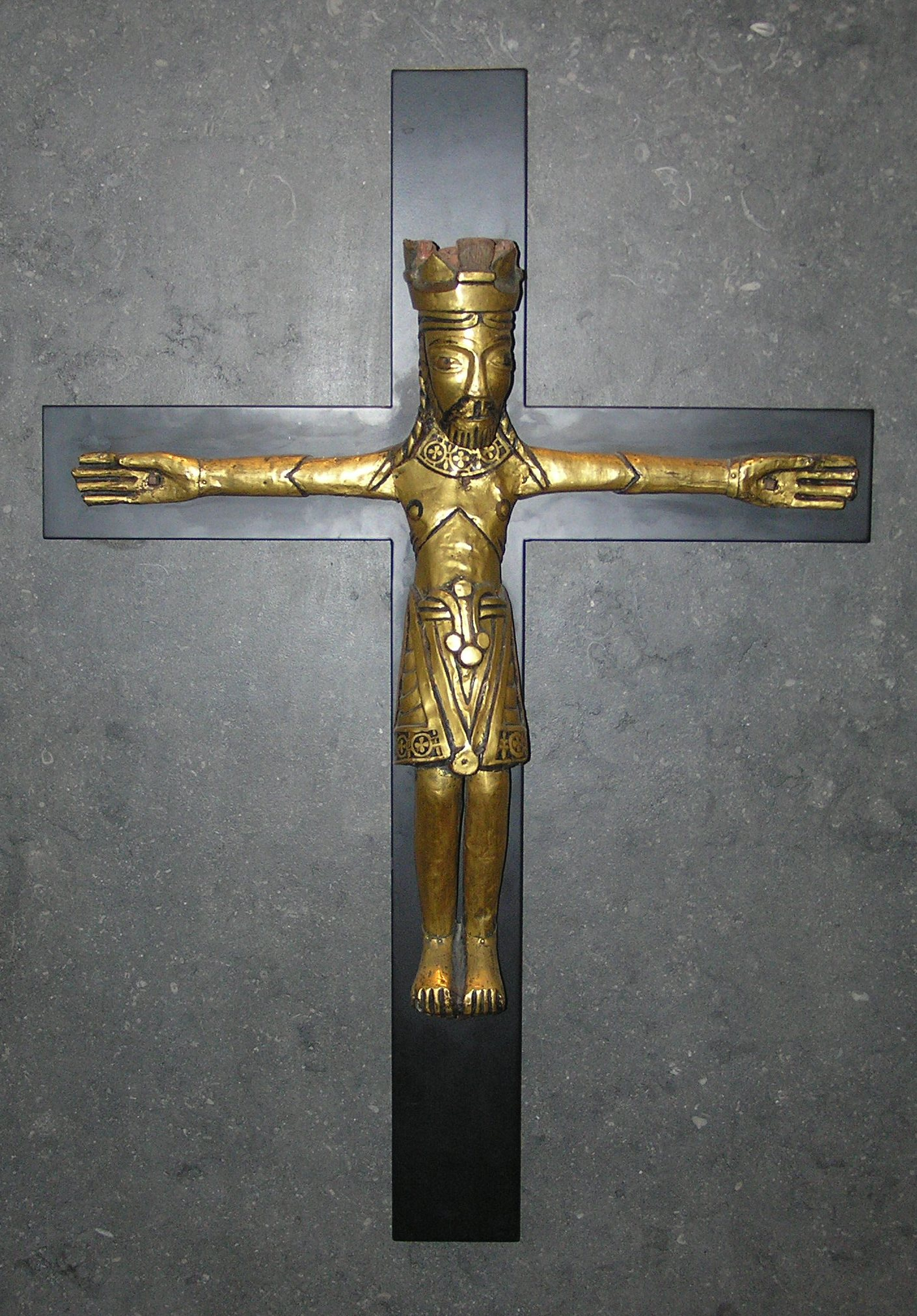 Krucifis fra Åby ved Århus fra tiden 1050-1100